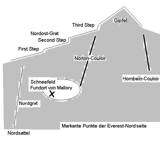 Eigene Skizze markanter Punkte der Nordwand des Mount Everest. GFDL-GNU-Lizenz. mailto